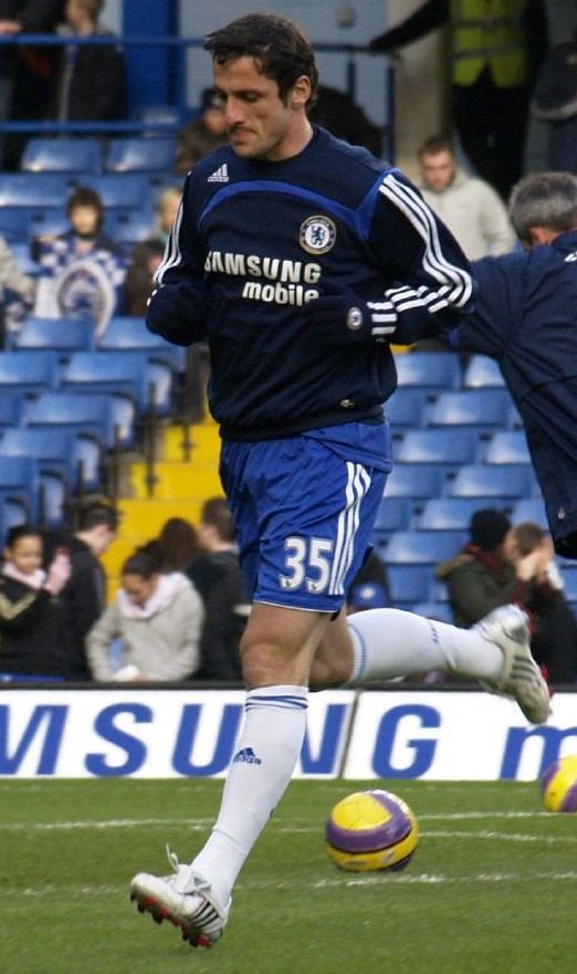 Juliano Belletti